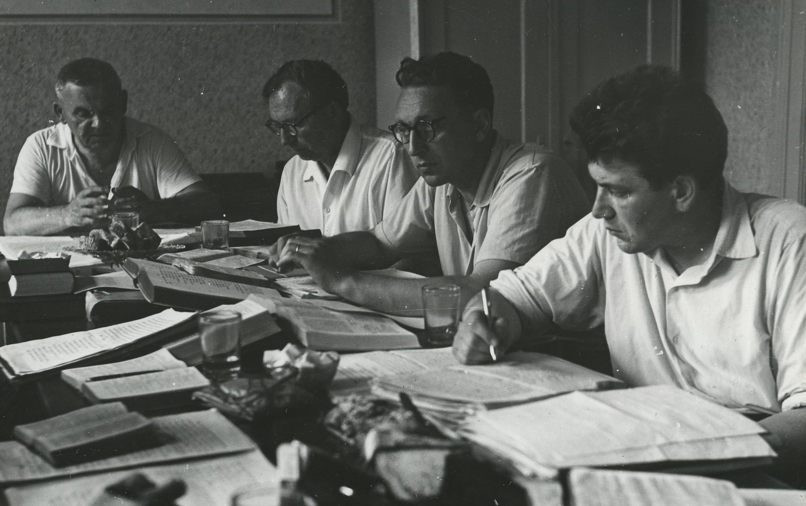 Překladatelská skupina při práci na Českém ekumenickém překladu Bible, Libice nad Cidlinou, 1964. V čele prof. Miloš Bič, 3. Bl. Drápal(?), vpravo senior Zdeněk Soušek